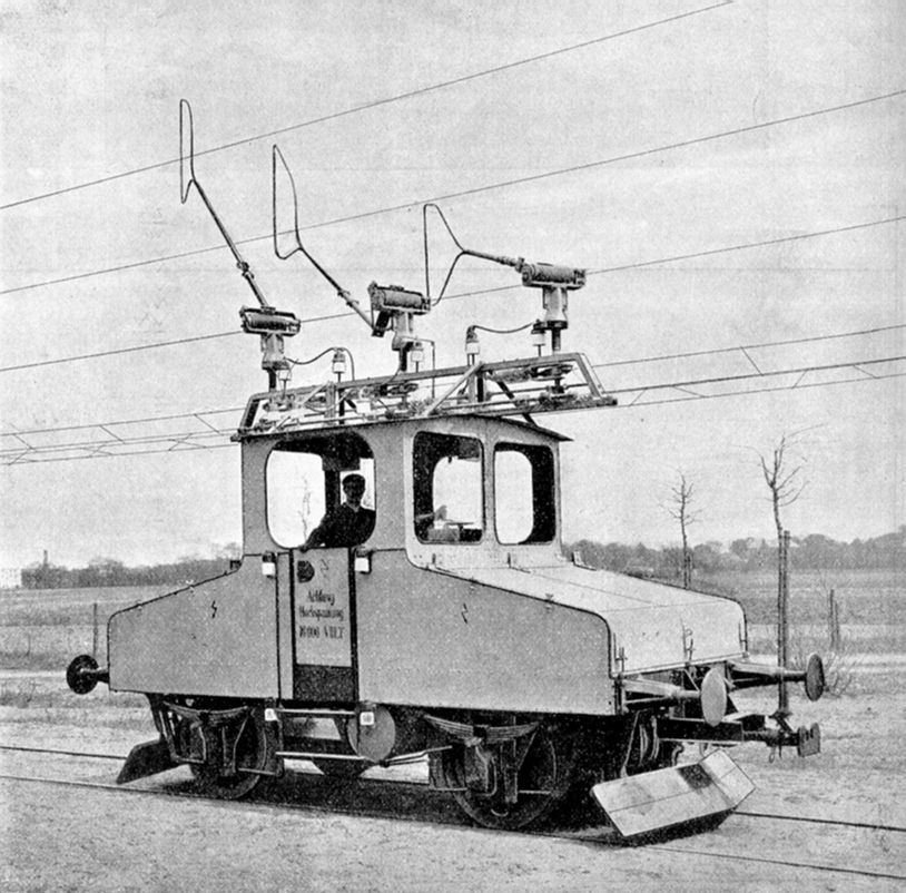 Lokomotive der Drehstrom-Versuchsstrecke Groß-Lichterfelde–Zehlendorf. Die Lokomotive wurde 1899 mit der Fabriknummer 303 von Siemens & Halske erbaut. Das Bild zeigt die Lokomotive nach dem Umbau von 1900, wo der ursprüngliche Holzkasten bereits durch einen Metallaufbau ersetzt war. Die Lok ist heute im Verkehrsmuseum Dresden ausgestellt.